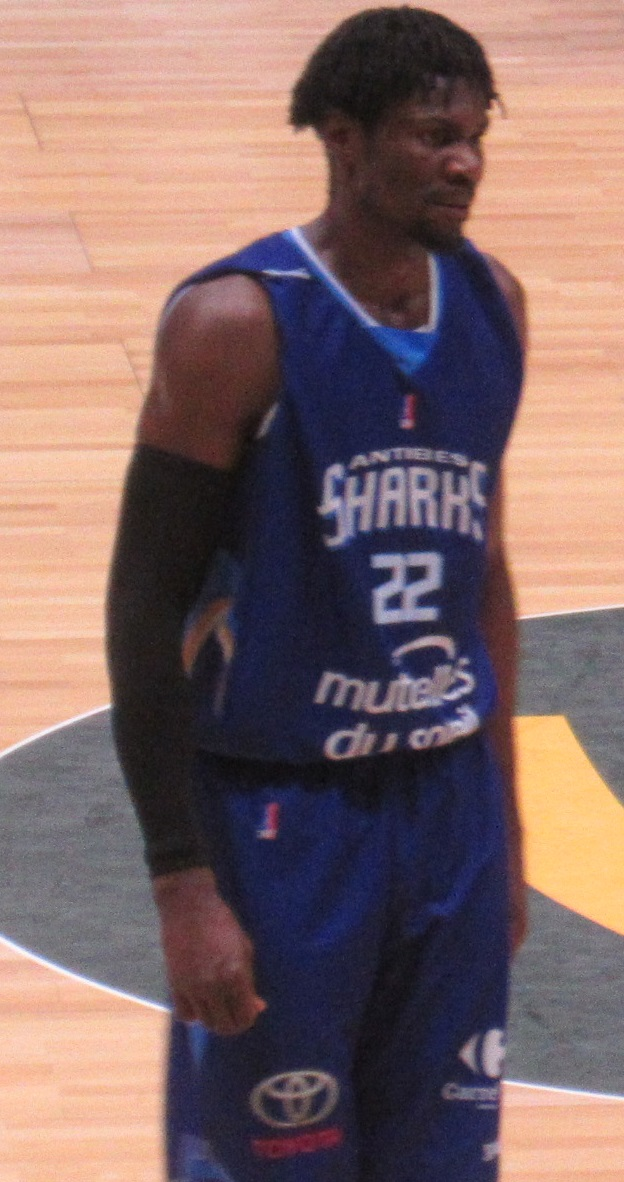 Max Kouguère avec le maillot d'Antibes